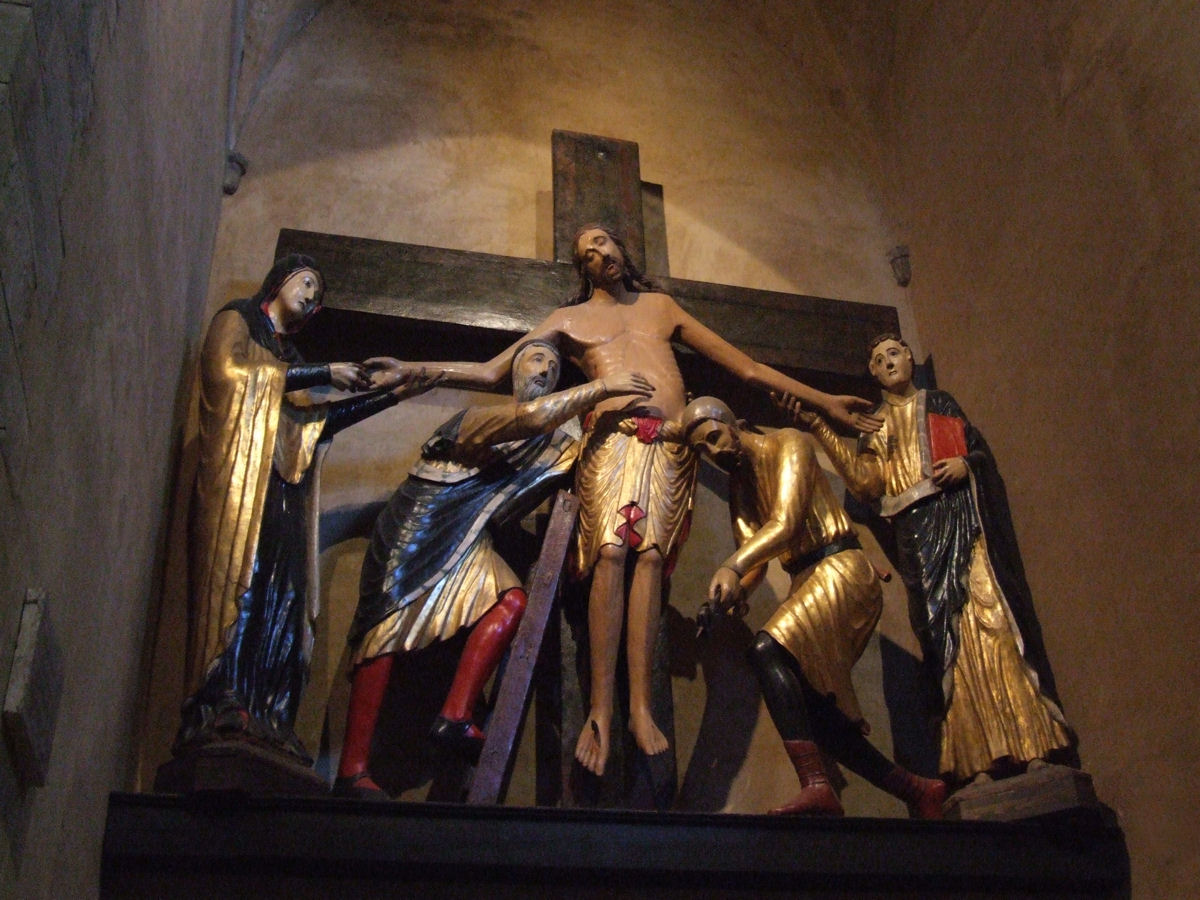 Duomo di Volterra (Volterra Cathedral), Volterra, Italy